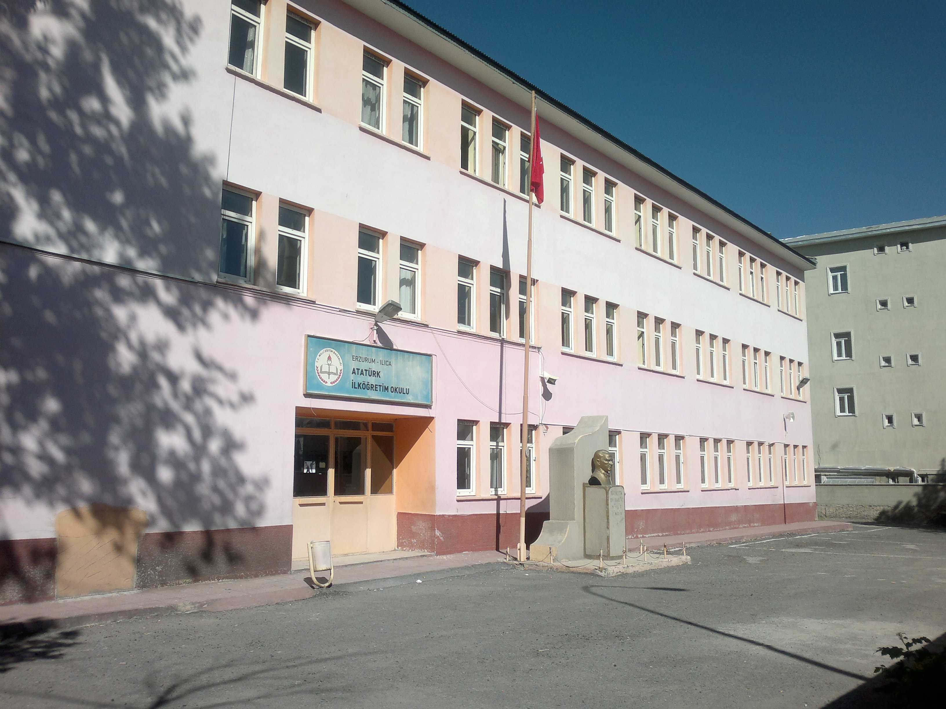 Erzurum Ilıca Atatürk İlköğretim Okulu